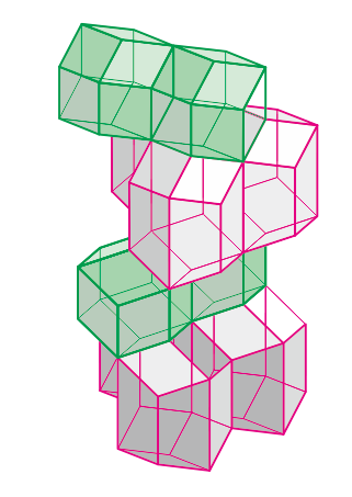 ヒ化ニッケル